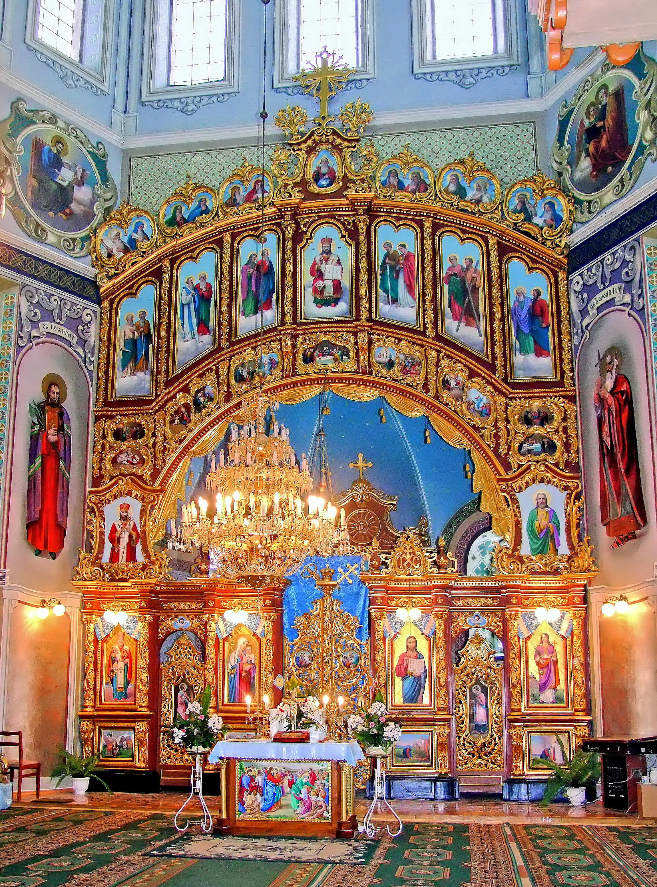 Ikonostas_crkv.Paraskovei_VB.jpg: Іконостас церкви великимучениці Паоасковеї -Пятниці у Великих Бірках